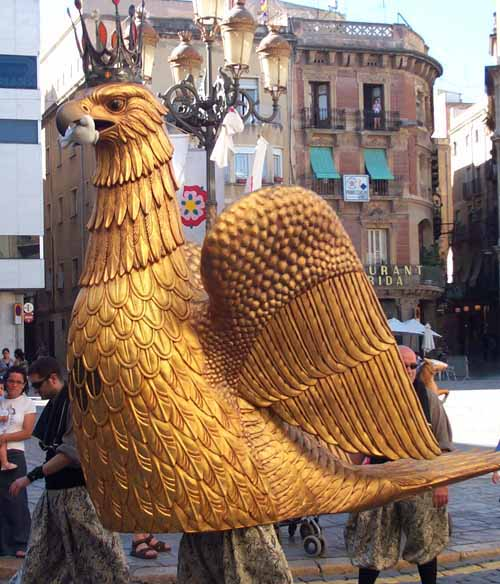 El Aguila de Reus, Fiestas de Sant Pere